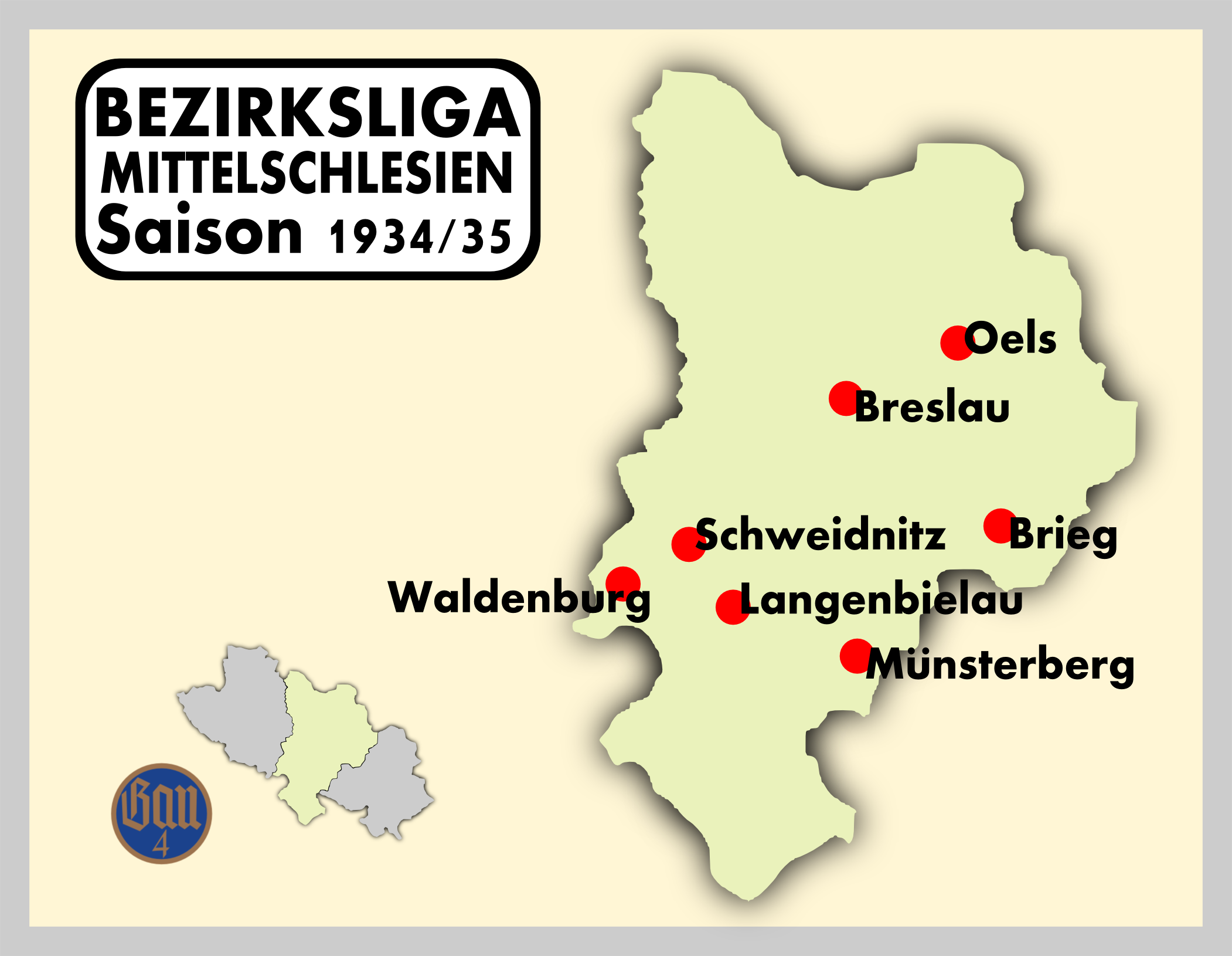 Spielorte der Bezirksliga Mittelschlesien 1934/35.